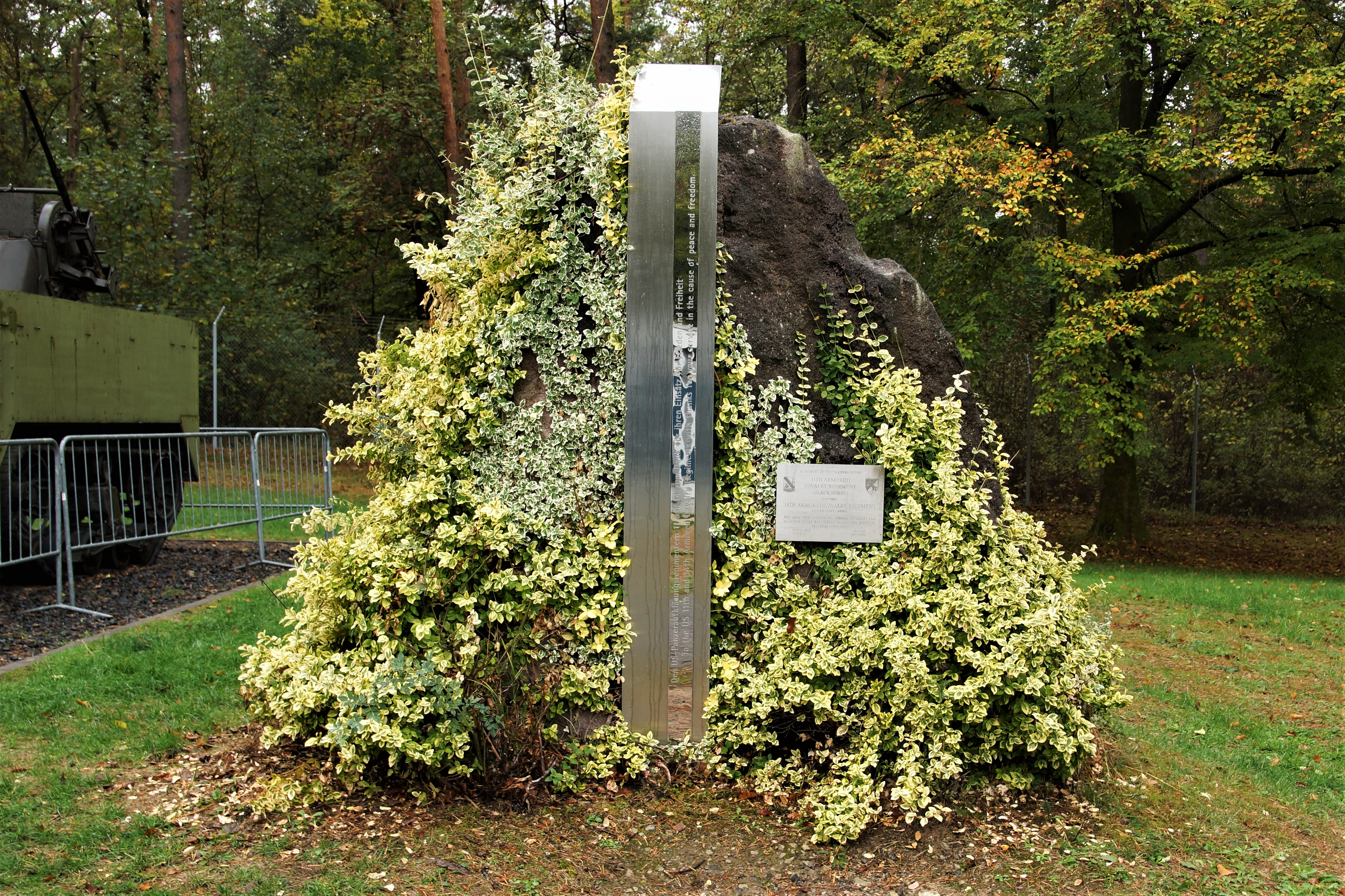 Gedenkstein "Den US-Panzeraufklärungsregimentern 11 und 14 für ihren Einsatz für Frieden Und Freiheit"